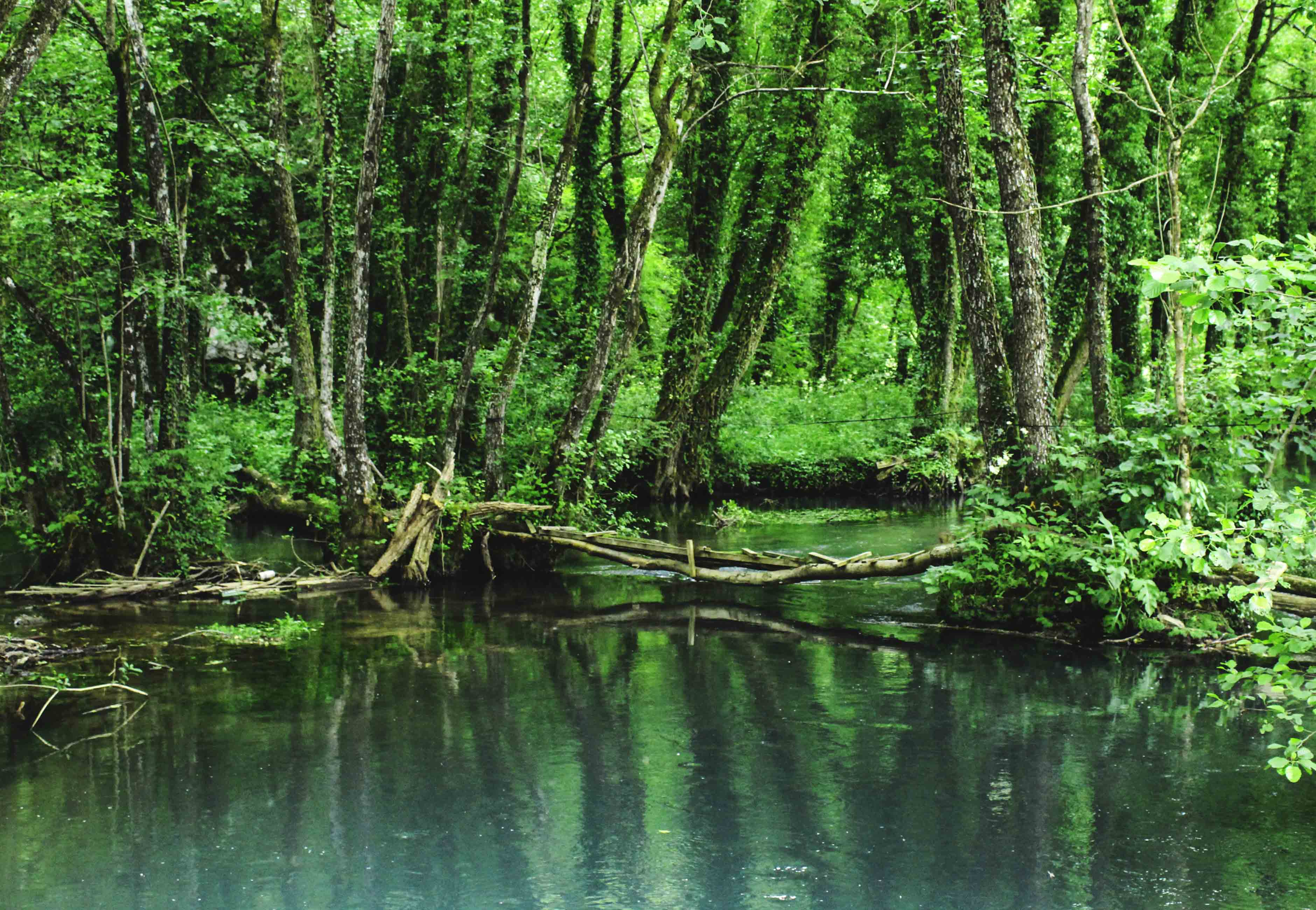 SPR001 Строги природни резерват „Прашума Јањ